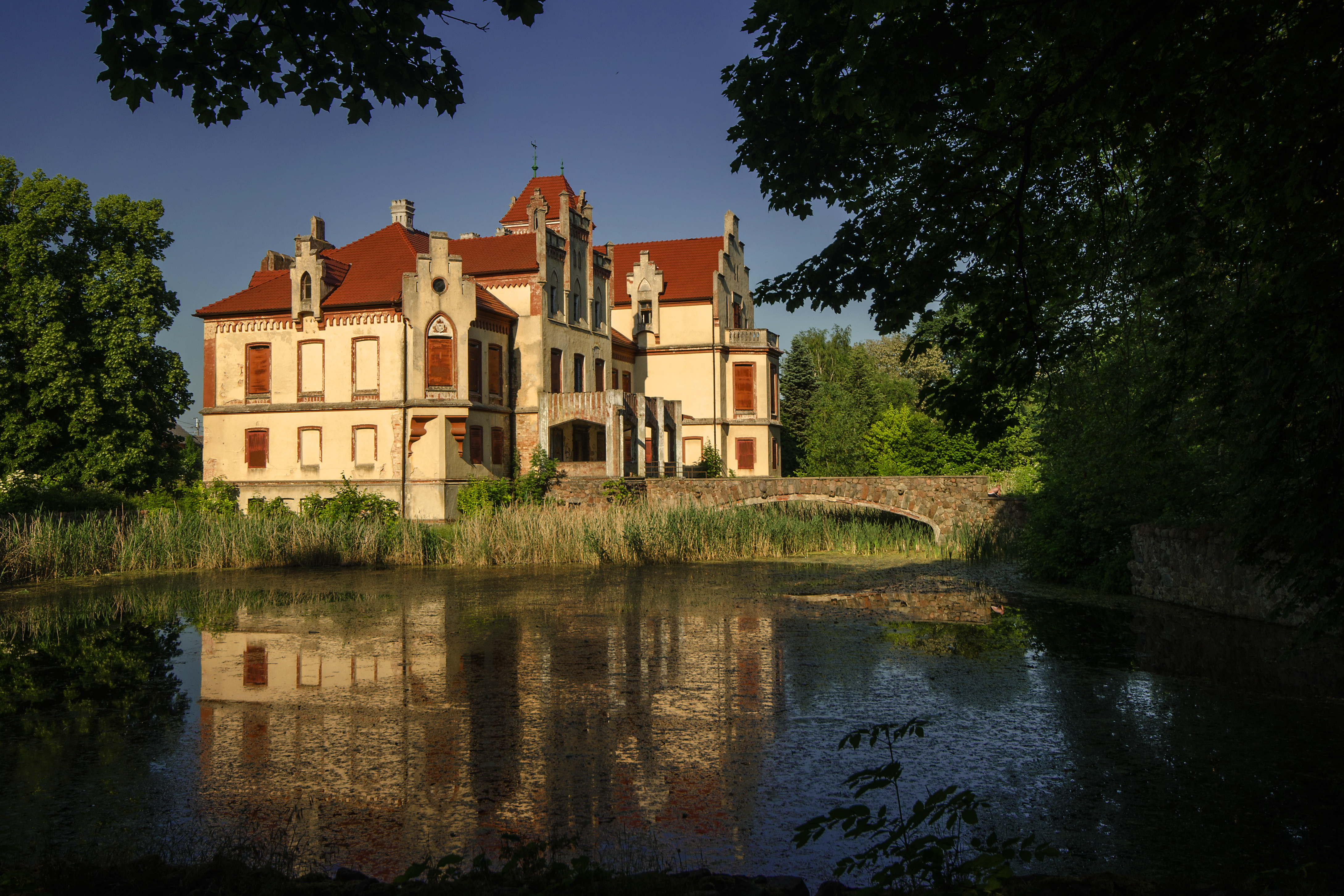 Kłoda Górowska, pałac, 3 ćw. XIX